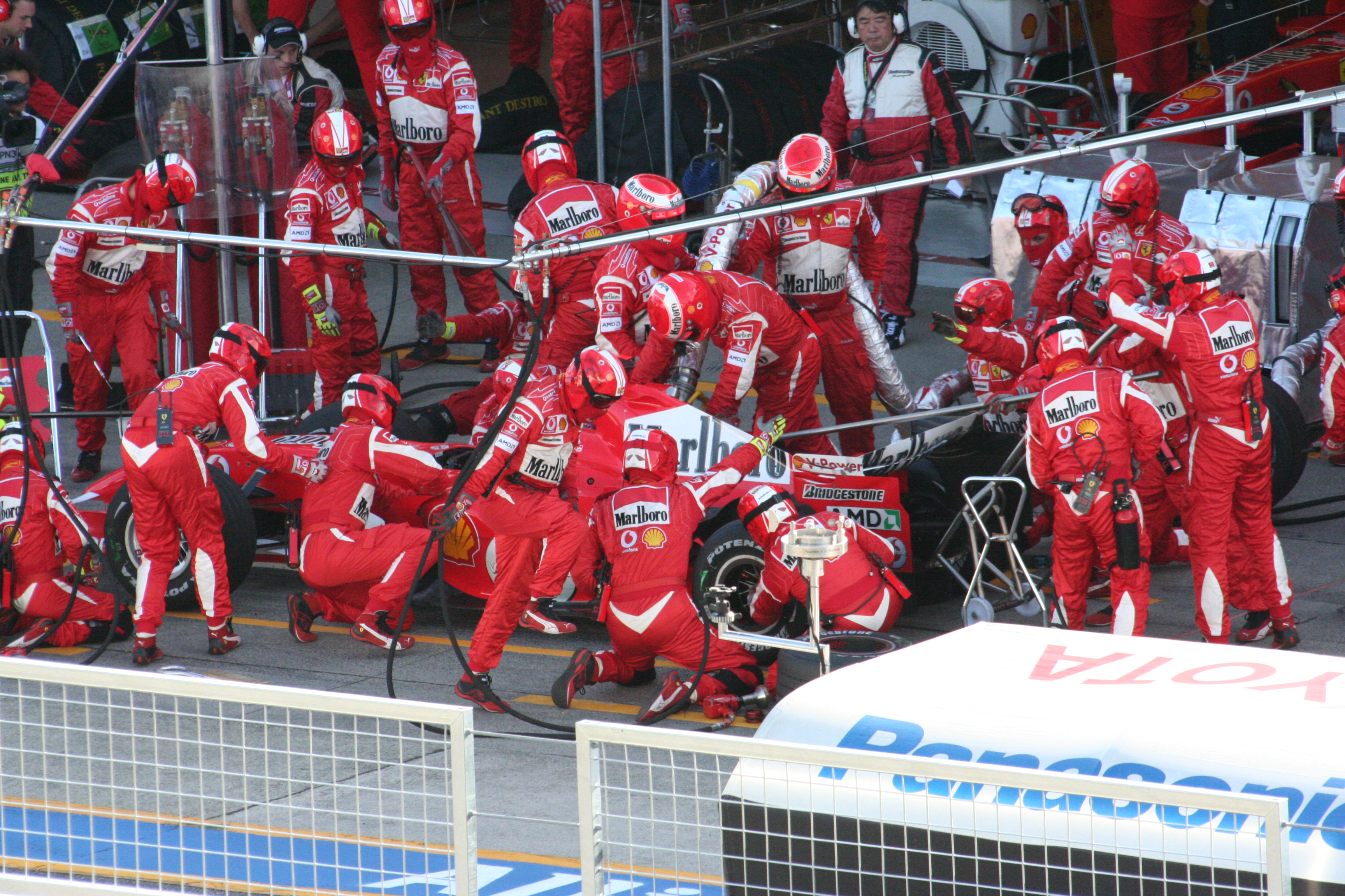 Scuderia Ferrari Pit Stop(Michael Schumacher) in 2006 Japanese Grand Prix